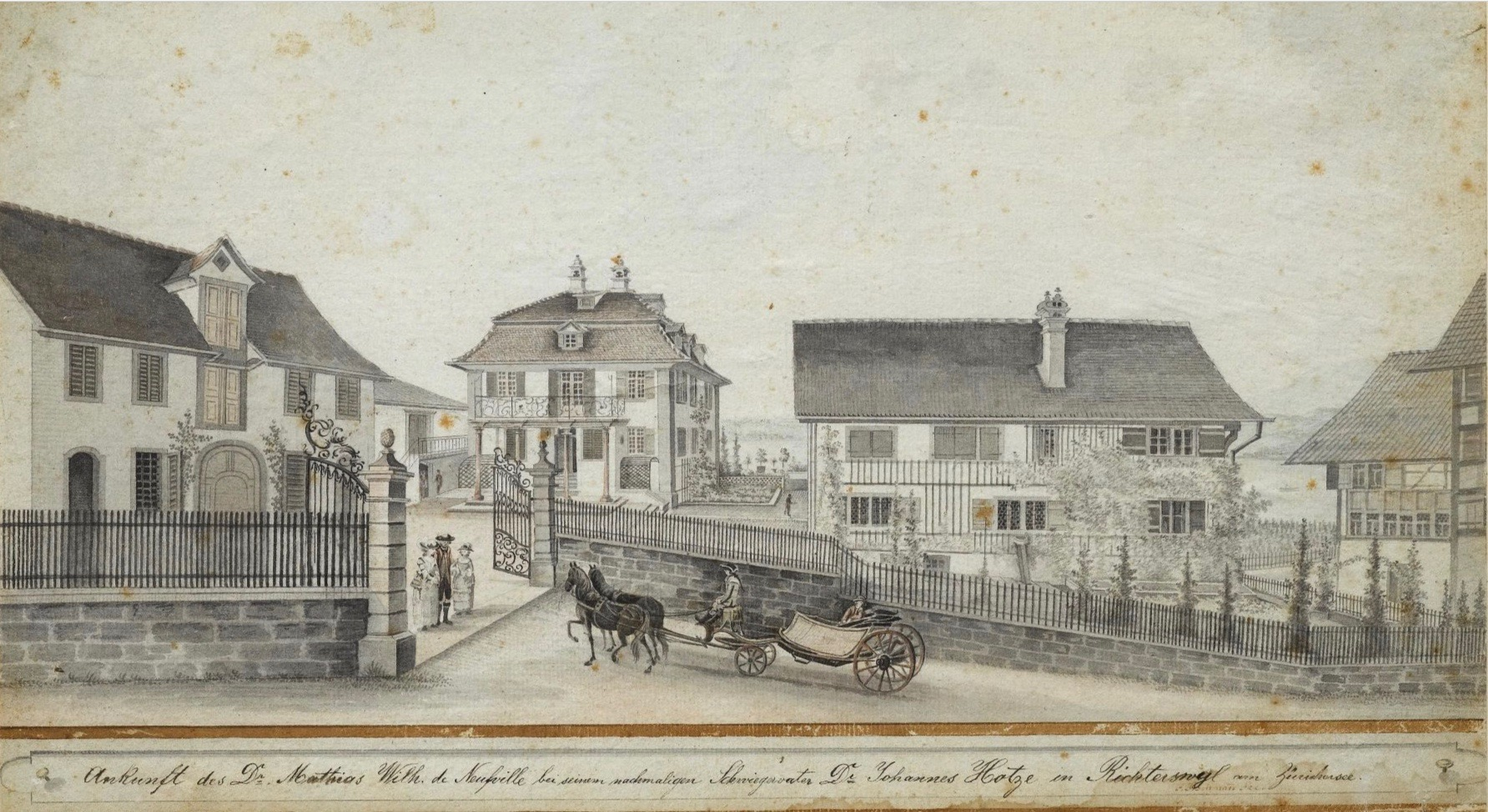 Johann Jakob Aschmann (1747–1809): Die Häuser von Dr. med. Johannes Hotze (1734–1801) in Richterswil, ca. 1787. Im Vordergrund Ankunft von Dr. med. Matthias Wilhelm de Neufville (1762–1842) aus Frankfurt am Main, der 1787 in Horgen Hotzes Tochter Regula genannt Renette (1769–1835) heiratete. In der Einfahrt wohl die Braut mit ihrem Vater und einem jüngeren Mädchen. Feder und Pinsel in Grau, Bleistift, Aquarell. 27,3 x 43,5 cm. Graphische Sammlung der Zentralbibliothek Zürich.